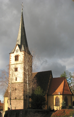 Evangelische Kirche Dossenheim